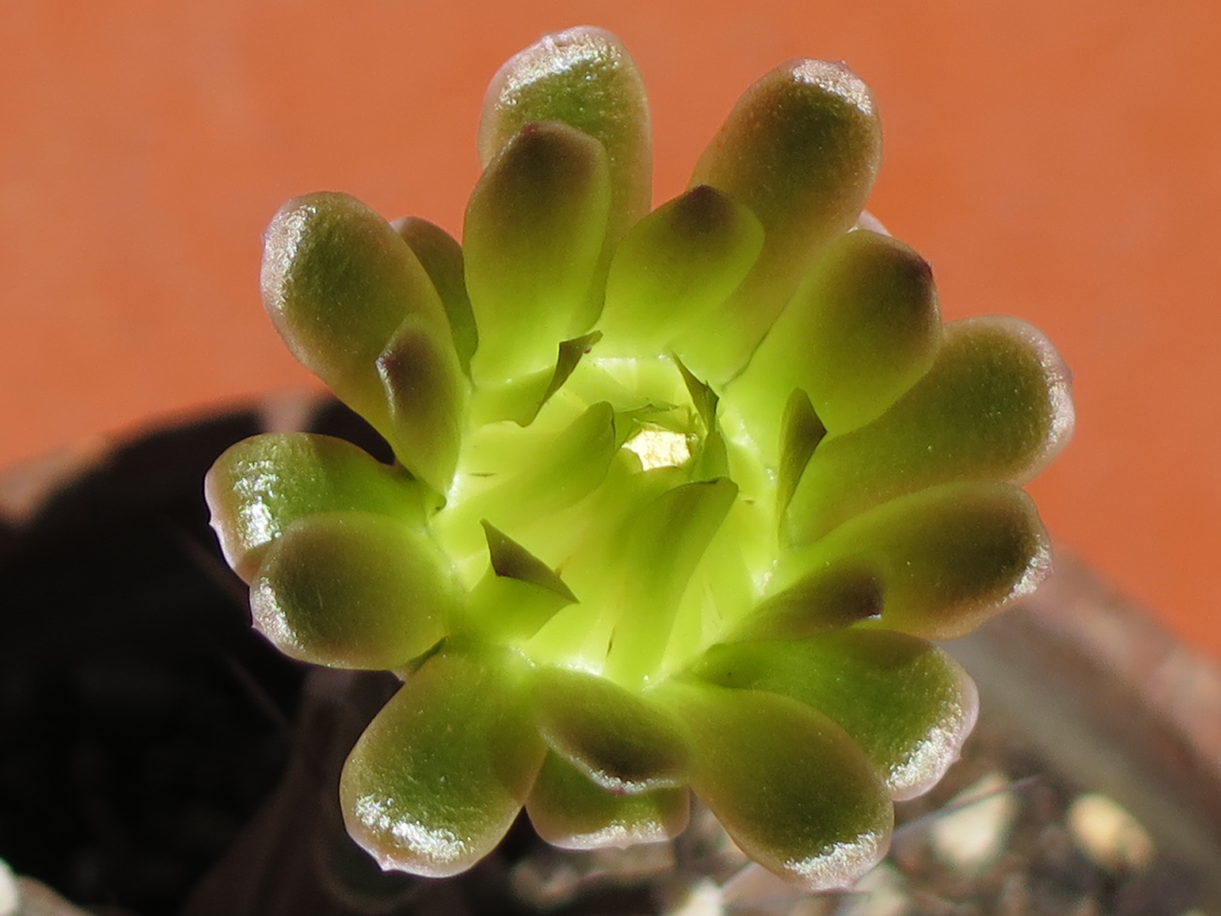 Fiore di gymnocalycium mihanovichii